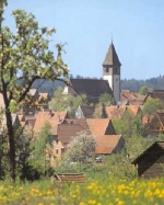 Altburg vom Norden aus gesehen